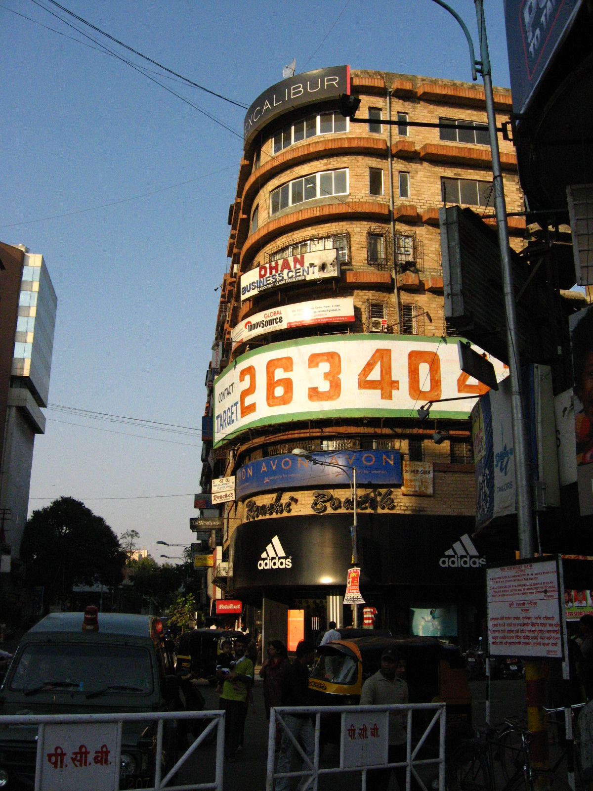 00056.jpg